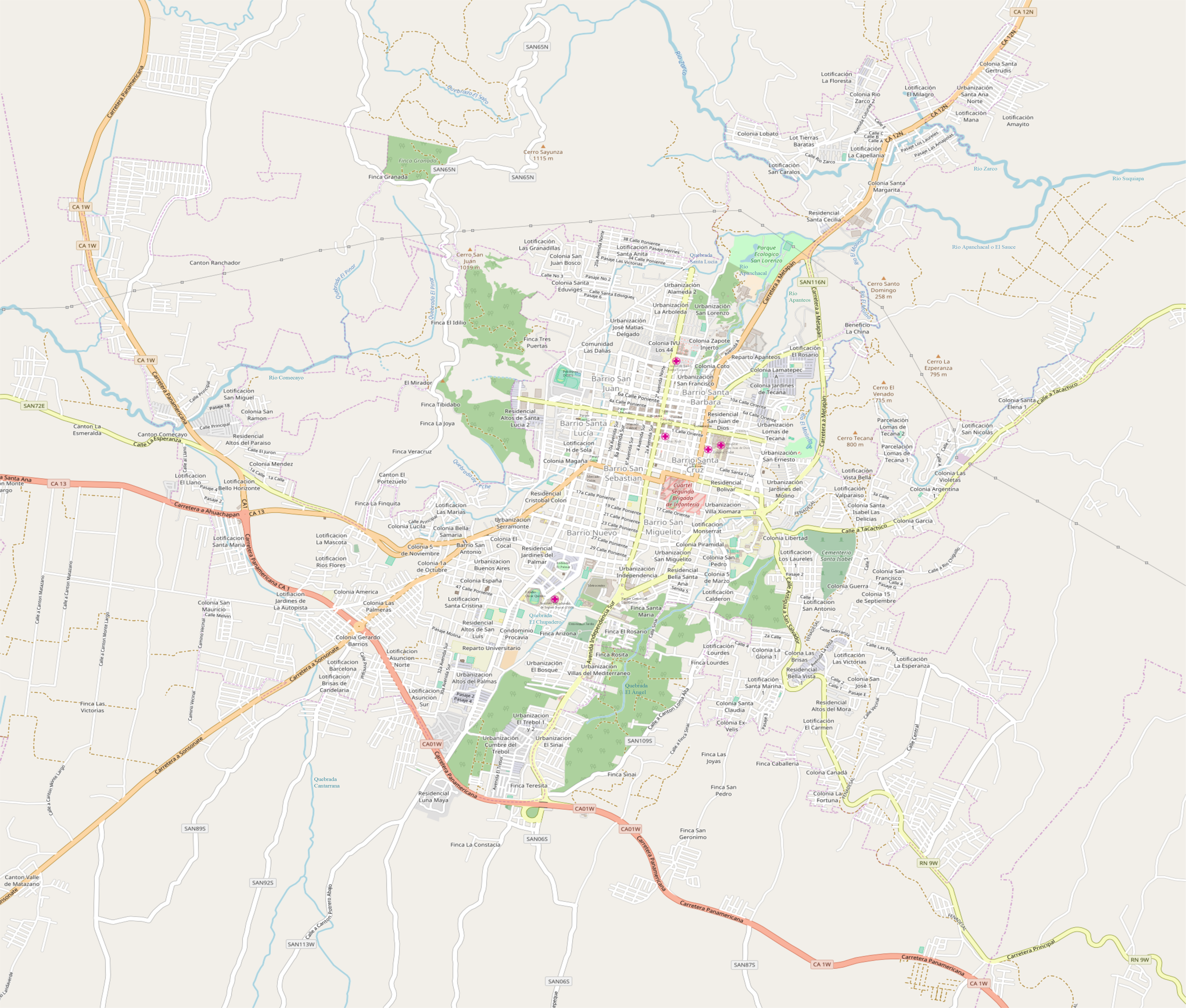 Área urbana de Santa Ana vista por OpenStreetMap This map of Santa Ana, El Salvador was created from OpenStreetMap project data, collected by the community. This map may be incomplete, and may contain errors. Don't rely solely on it for navigation.